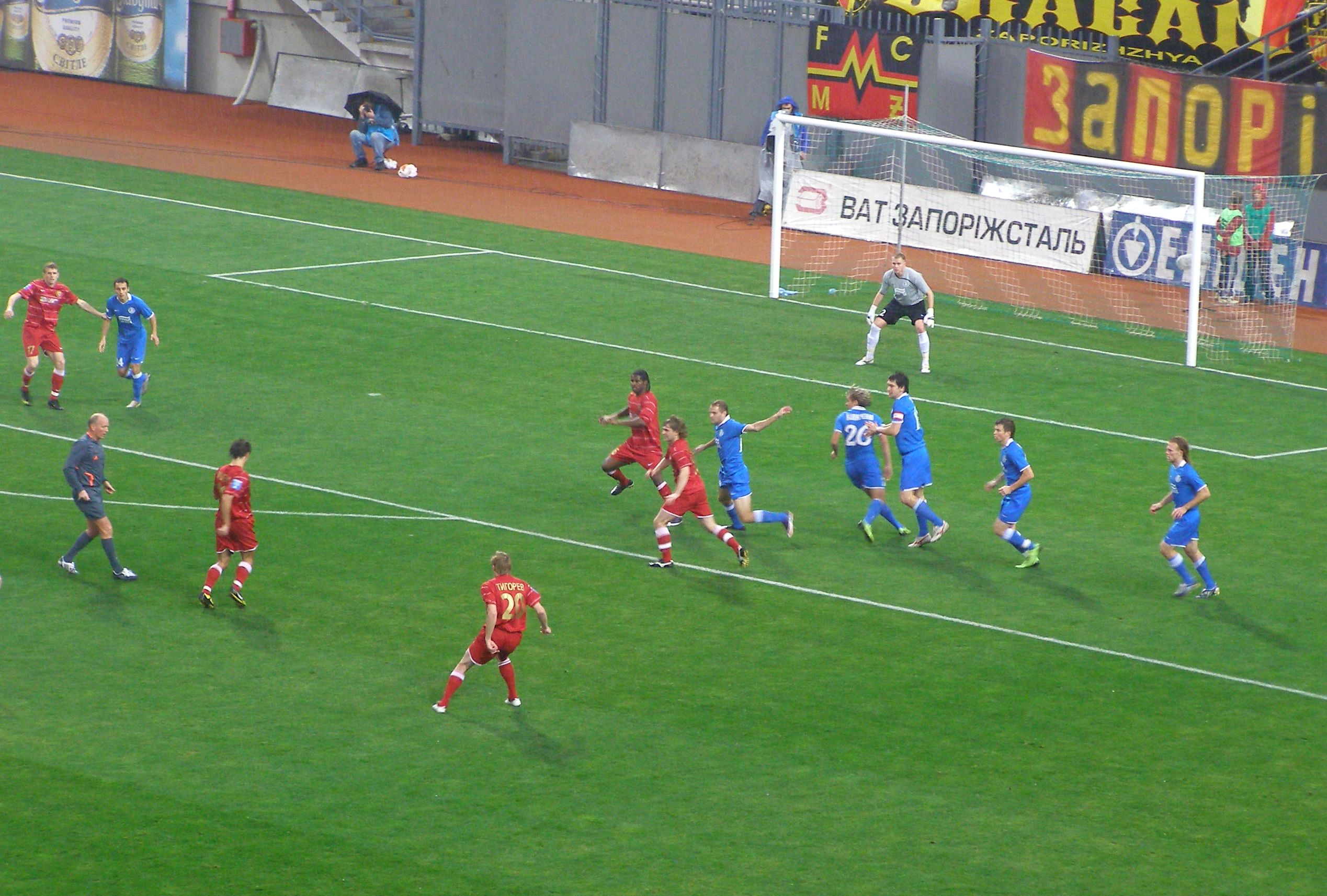 Metalurg Saporischschja vs Dnipro Dnipropetrowsk